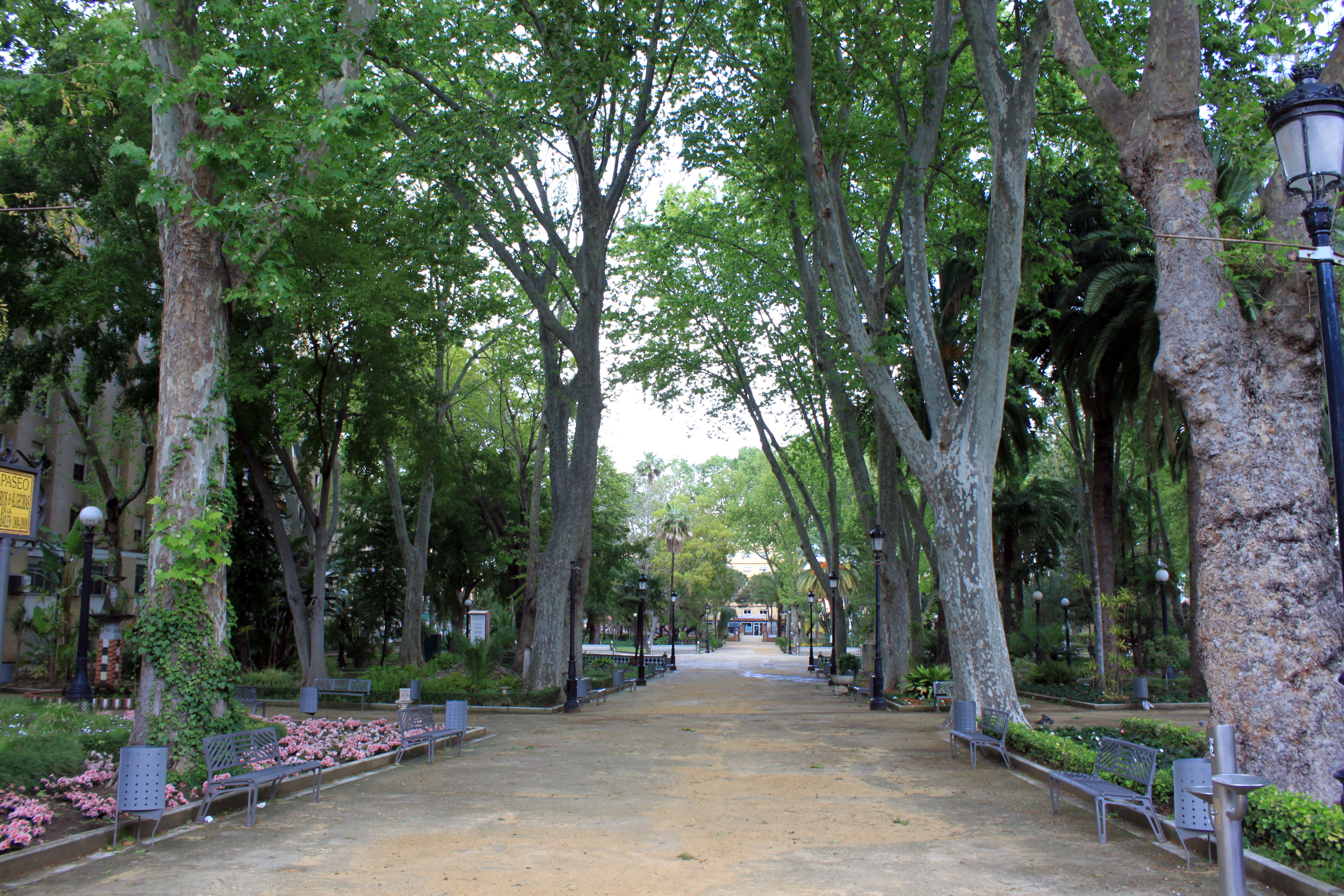 Vista del Parque María Cristina de la localidad andaluza de Algeciras, España.